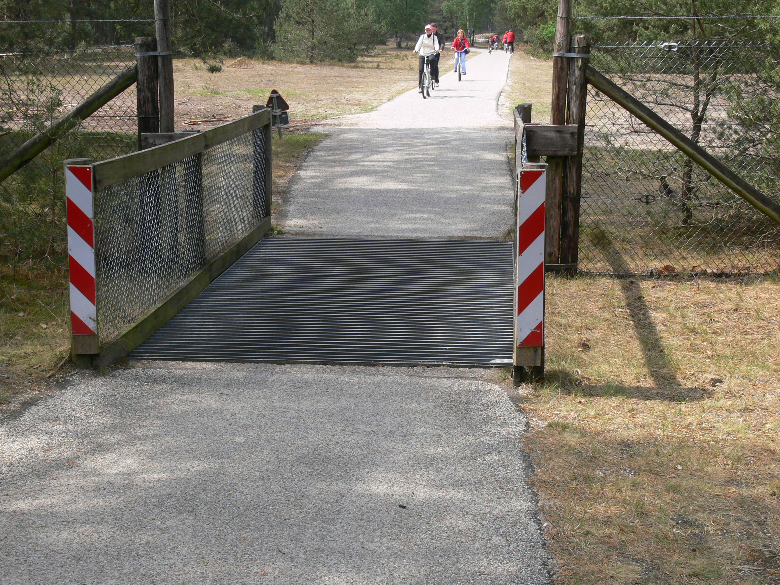 Paysage du Hoge Veluwe (Nationaal Park De Hoge Veluwe) , parc naturel national des Pays-Bas, qui offre au public - sur entrée payante - environ 5000 ha (précisément 54,5 km² ) de nature restaurée sur une ancienne zone agricole rachetée et boisée par deux riches néerlandais au début du siècle. Ce parc abrite des paysages exceptionnels, et bien que clôturé est un des grands noyaux du réseau écologique néerlandais. Il abrite de nombreuses espèces protégées et a contribué par son Centre d'interprétation à sensibiliser plusieurs millions de personnes à la rsetauration et protection de l'environnement et plus particulièrement à la restauration de la naturalité des paysages, qui est caractéristique de ce site. Le parc est divisé en zones dont certaines interdites aux grands herbivores sauvages (cerf, mouflons) et sangliers. Les pas canadiens (alignements de barres d'acier au dessus d'une fosse) suffisent à maintenir les animaux du même côté de la clôture.